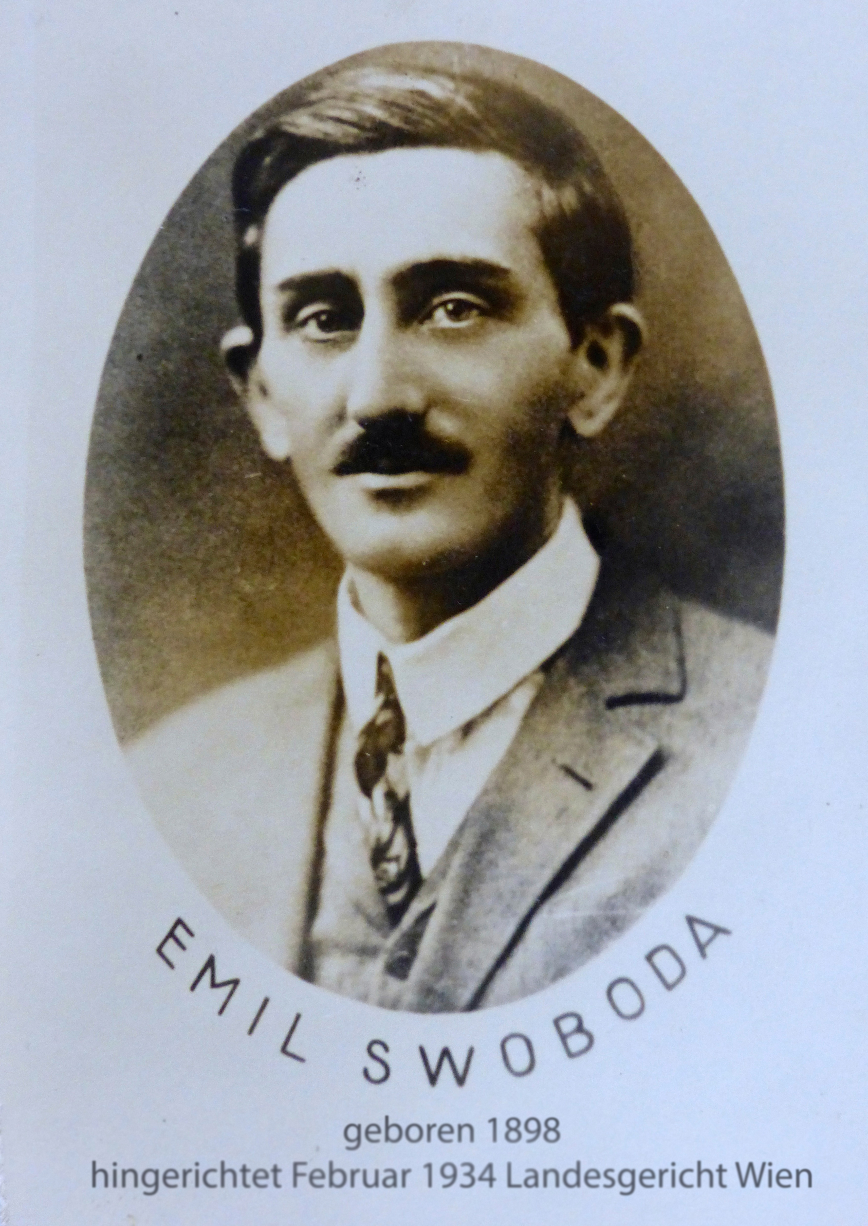 Widerstandskämpfer gegen den Austrofaschismus und Mitglied des Republikanischen Schutzbundes